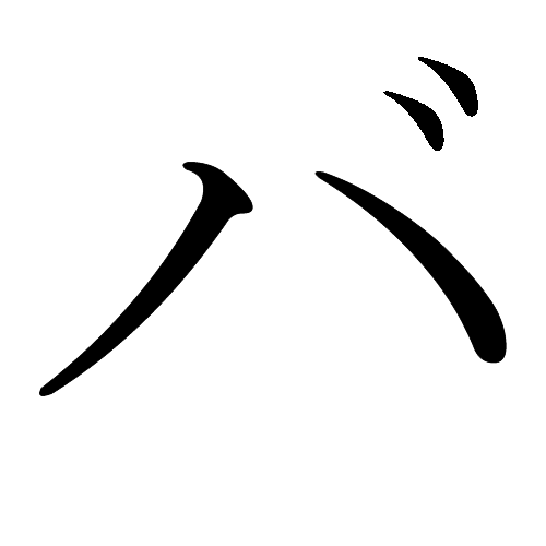 Japanese Katakana "Ba"